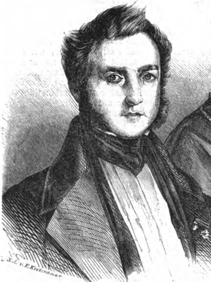 Justin Timotheus Balthasar von Linde, Kanzler der Universität Gießen, 1845.